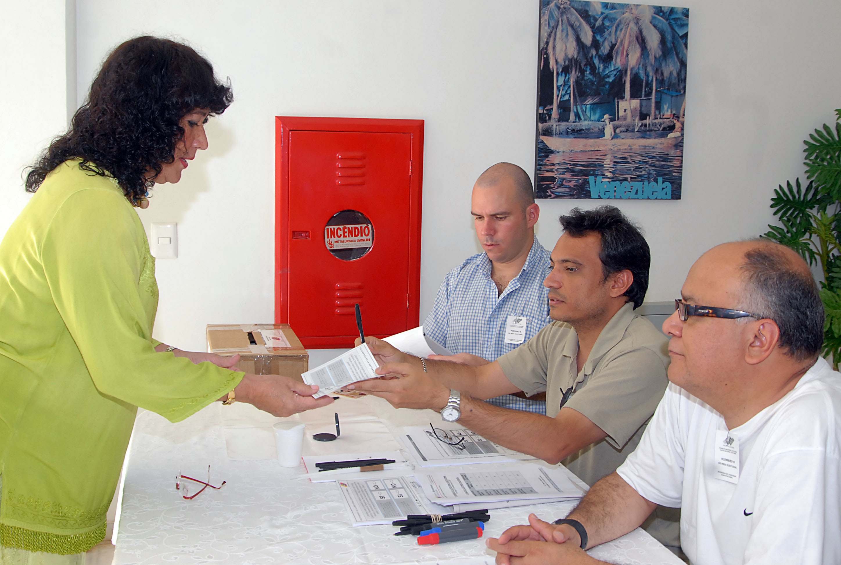 Venezolanos residentes en Brasil, votando en la Embajado de Venezuela para ver si reforma la constitución venezolana.